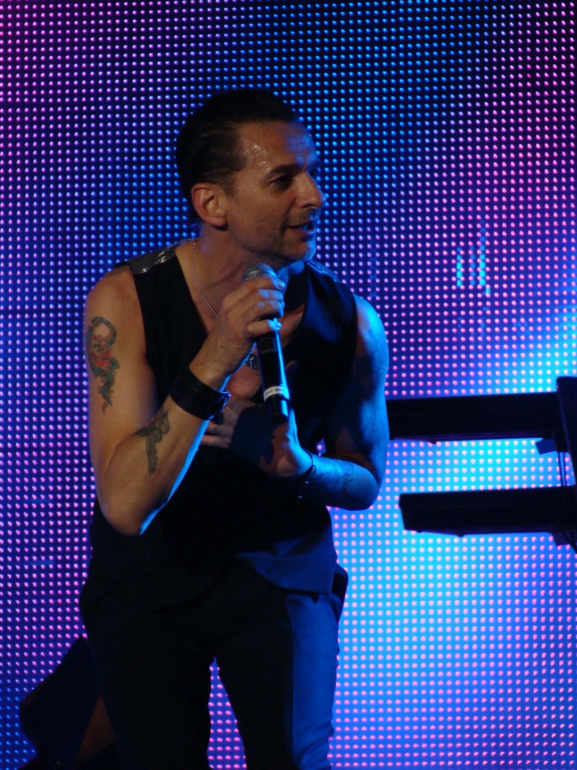 Dave Gahan, en un concierto de Depeche Mode en el Bilbao BBK Live 2009.